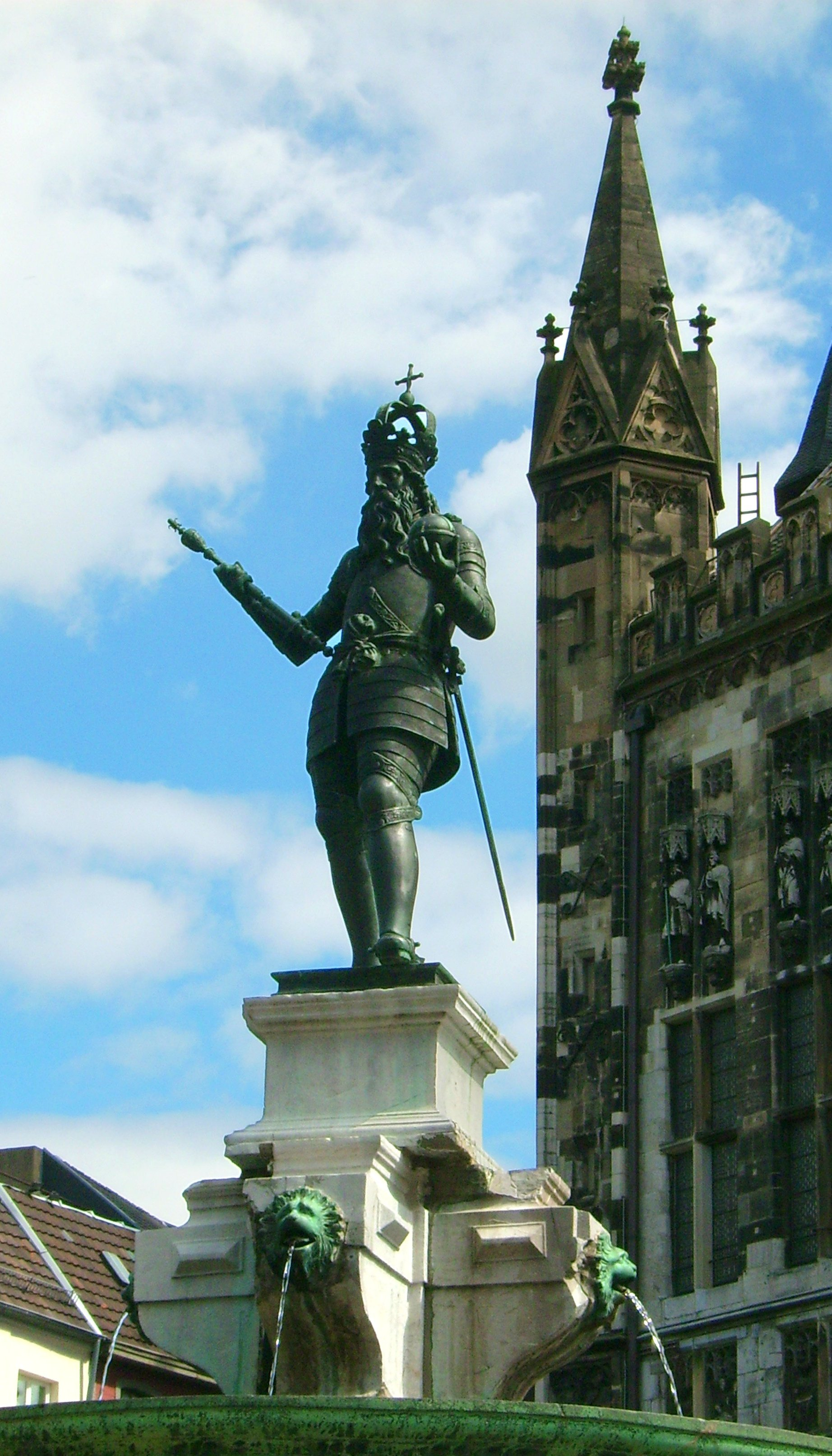 Statue Karls des Großen auf dem Marktplatz in Aachen